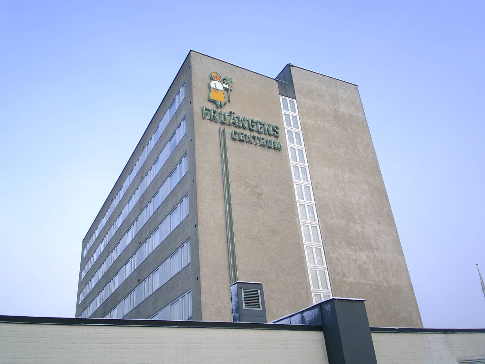 Skyscraper in Fruängen, Stockholm. Bild på ett höghus i Fruängen, Stockholm.